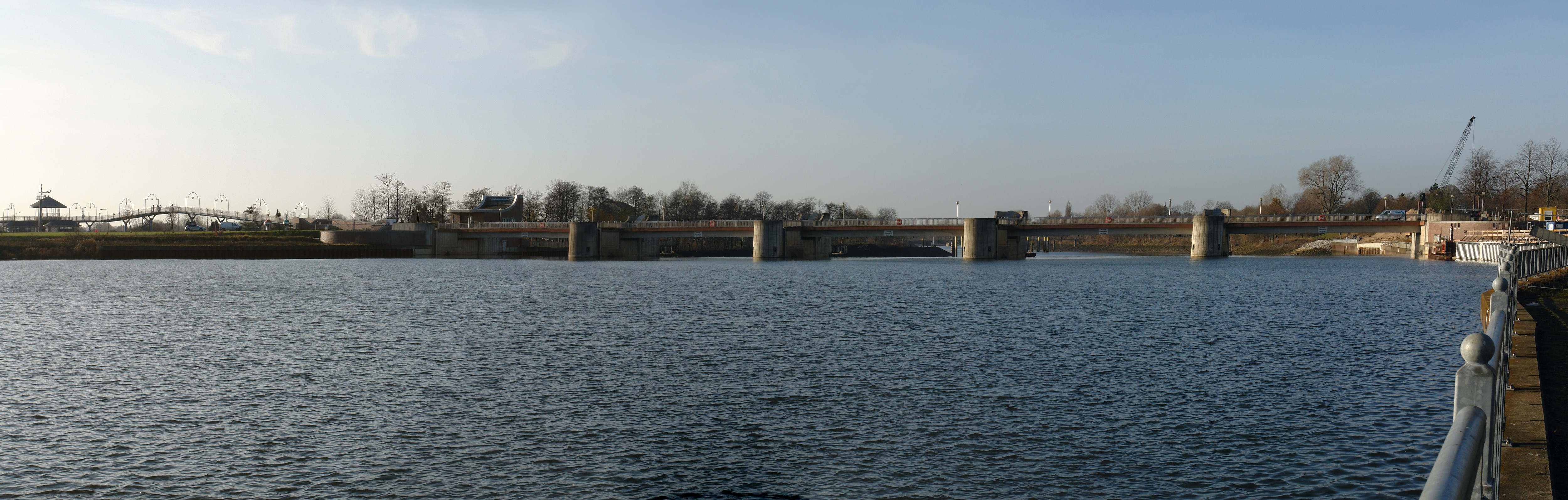 Weserwehr Bremen, Oberwasser. Am linken Rand die Fußgängerbrücke über die Schleusen, am rechten Rand der Einlauf zum Weserkraftwerk